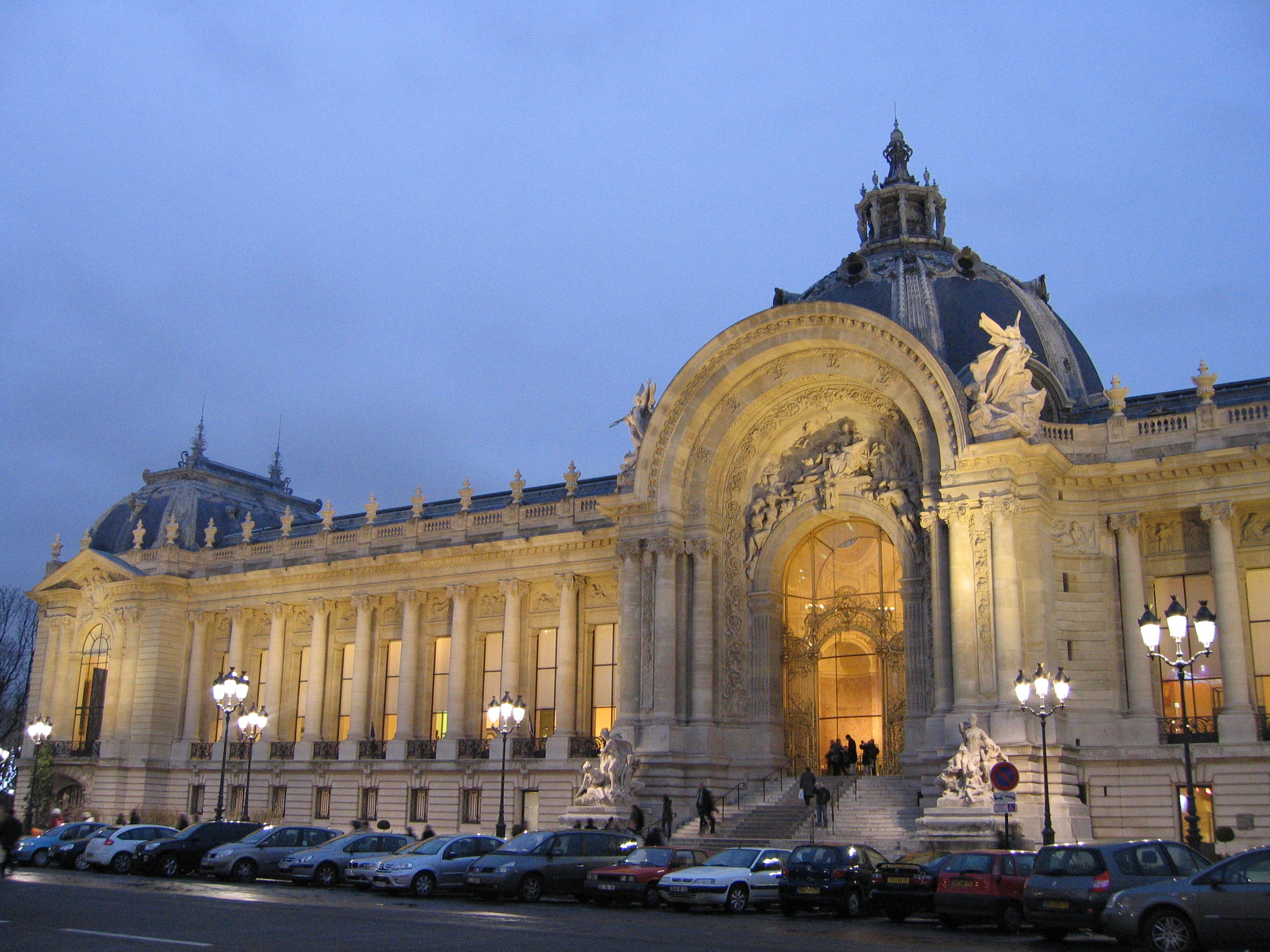 Petit Palais détail